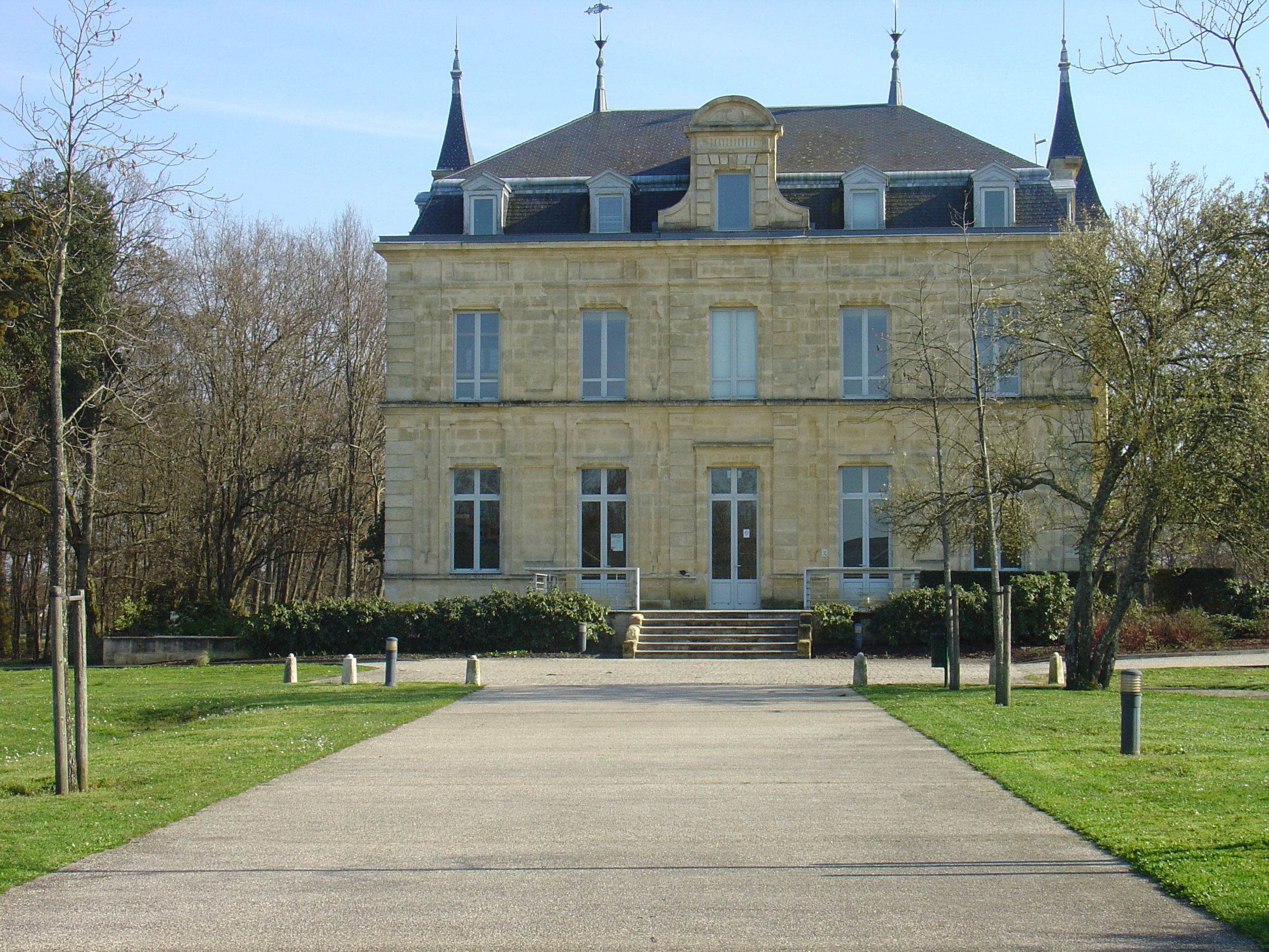 Photo du Chateau Cazalet à Pessac prise en mars 2007 par Carmen Buze